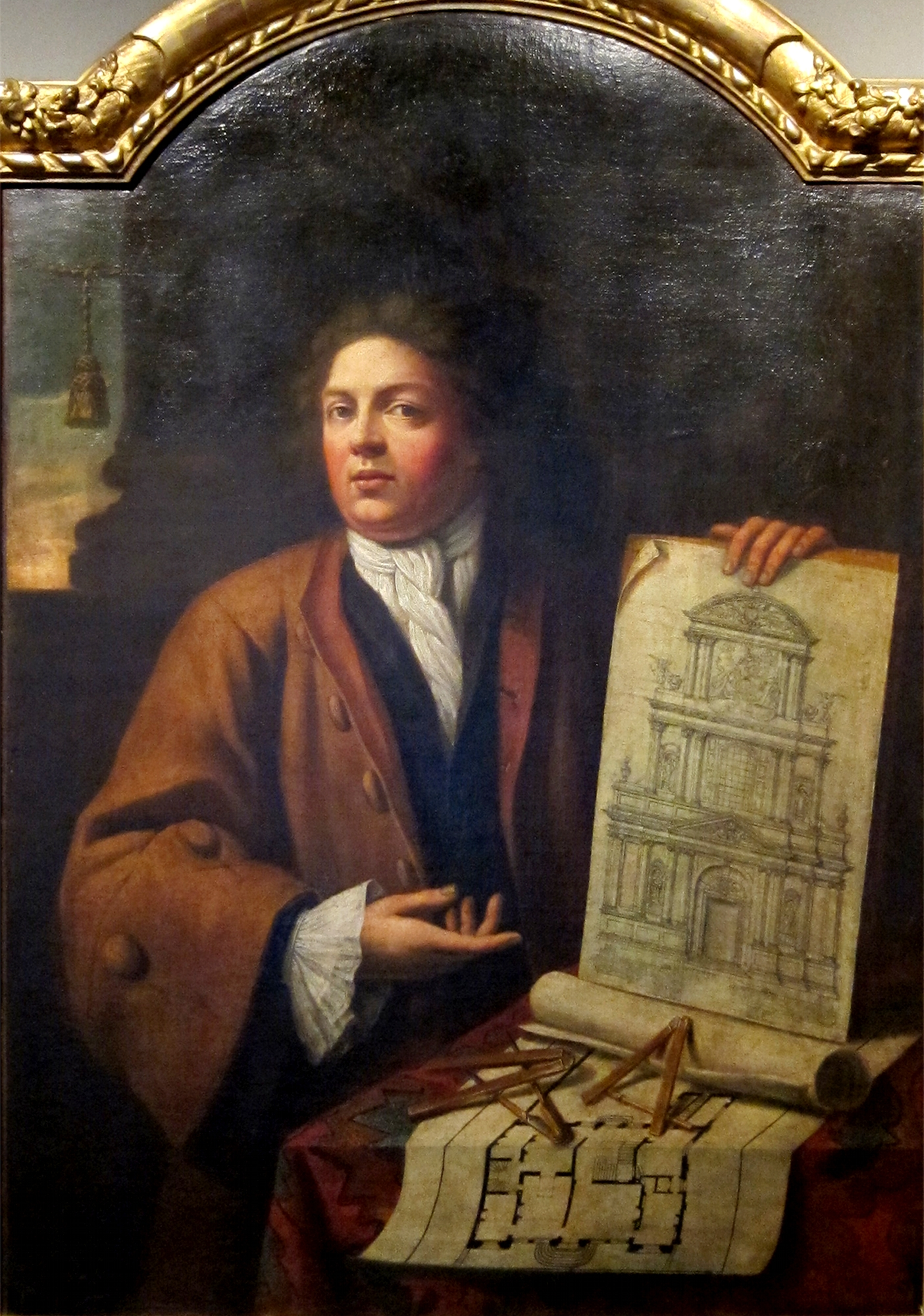 Portrait de Thomas-Joseph Gombert (1672-1724)